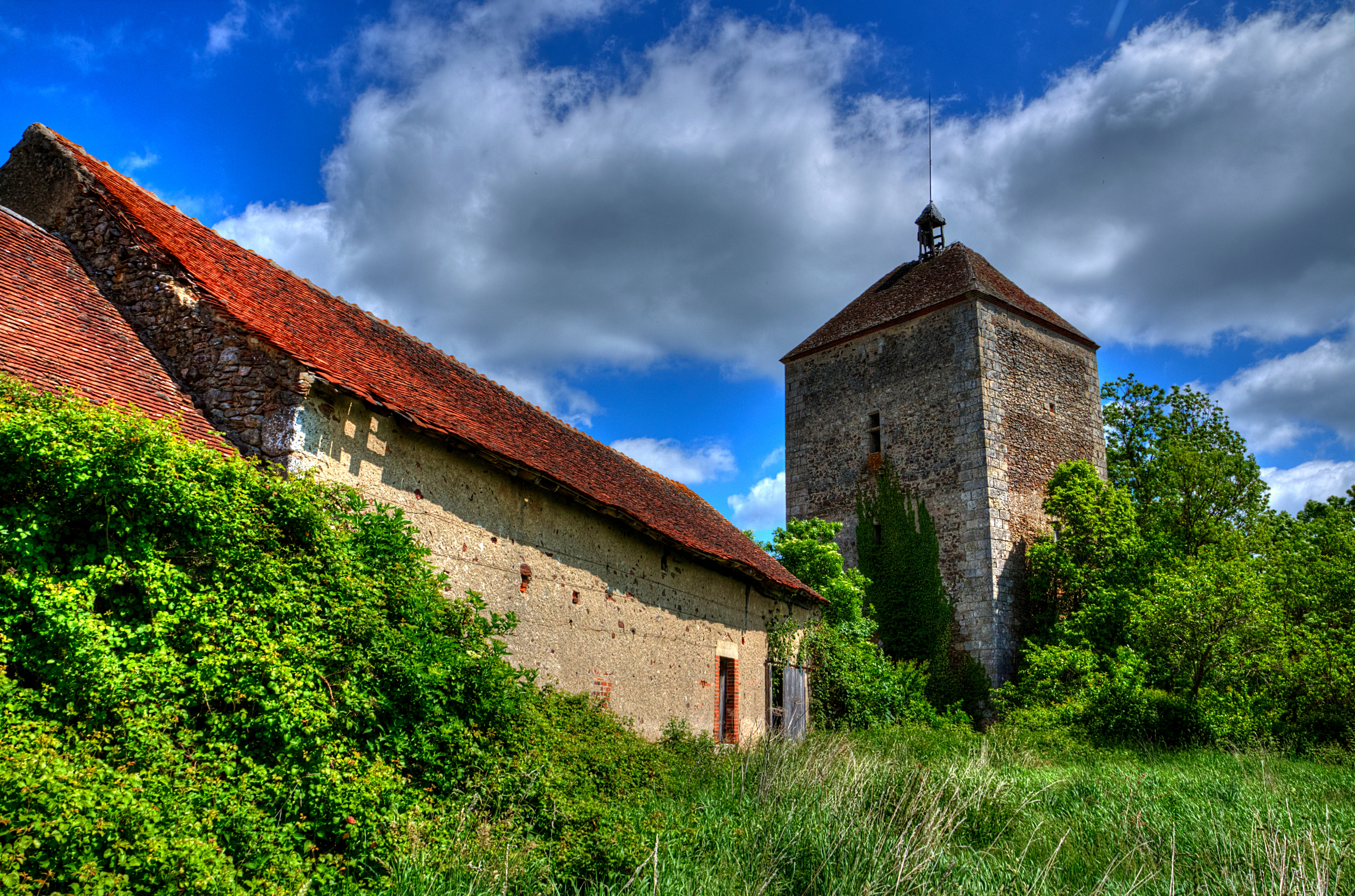 Donjon de Chenillat, XVème siècle, Cesset